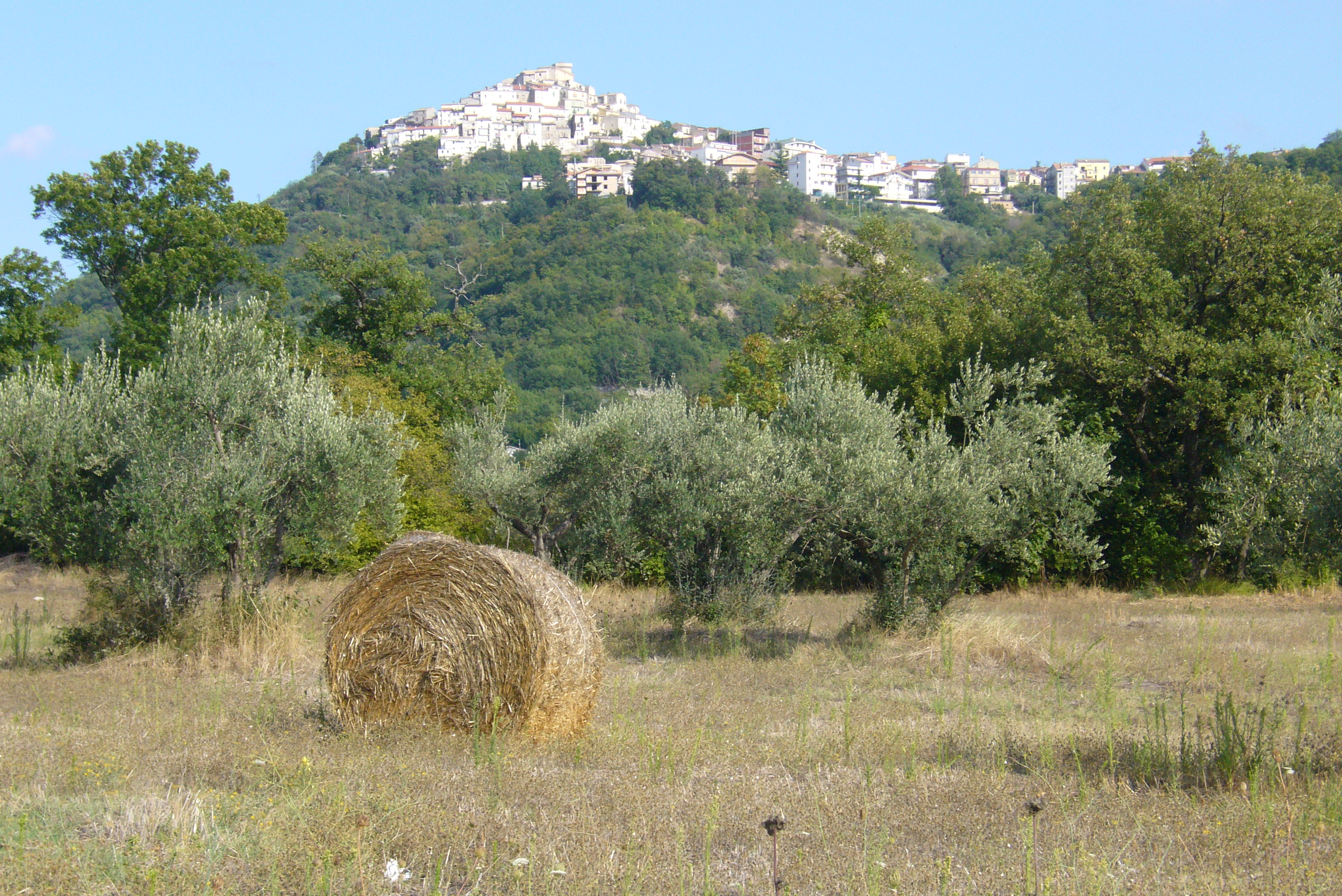 Casoli